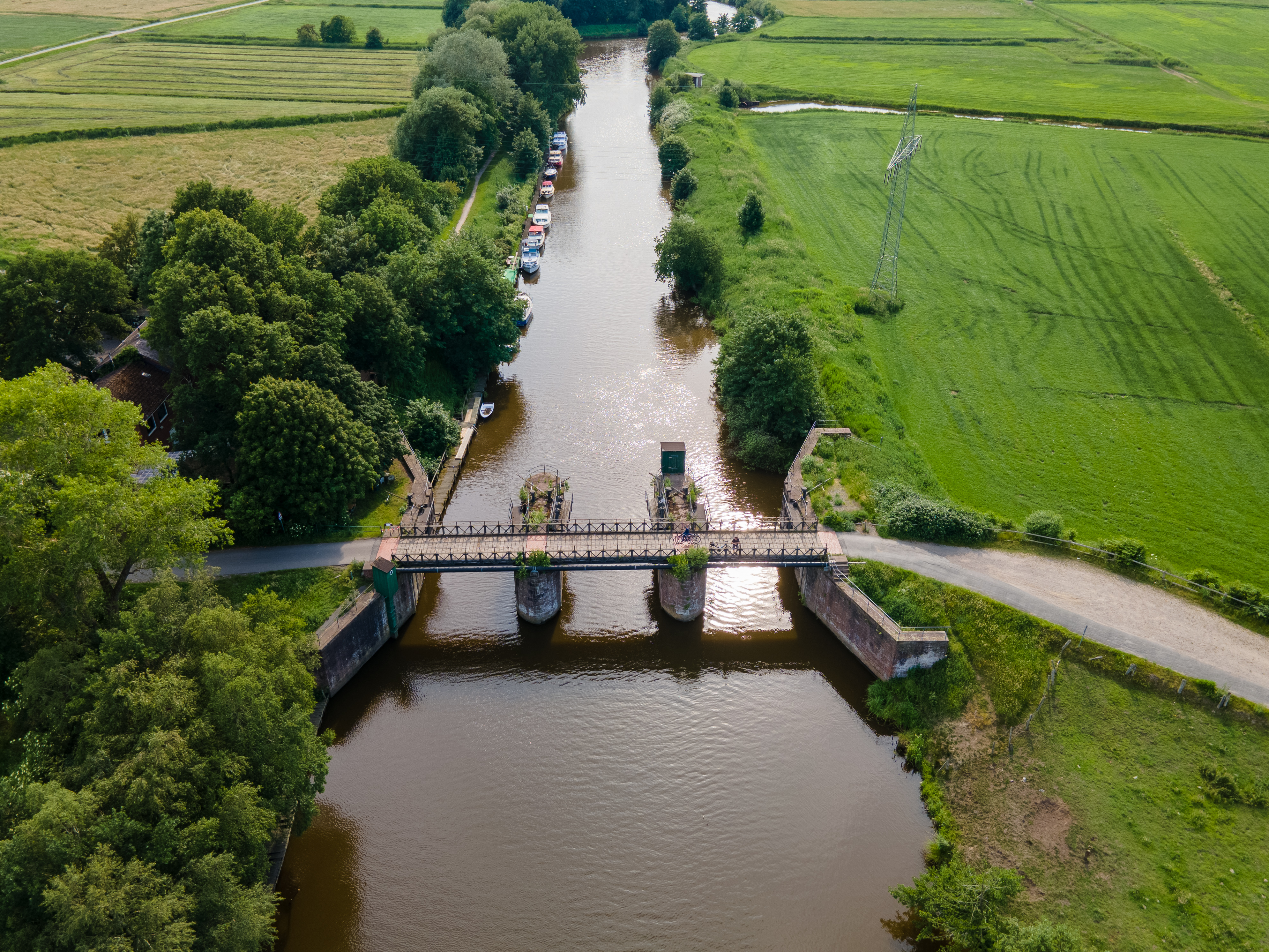 Luftaufnahme der Schiffdorfer Stauschleuse in Blickrichtung Bremerhaven.